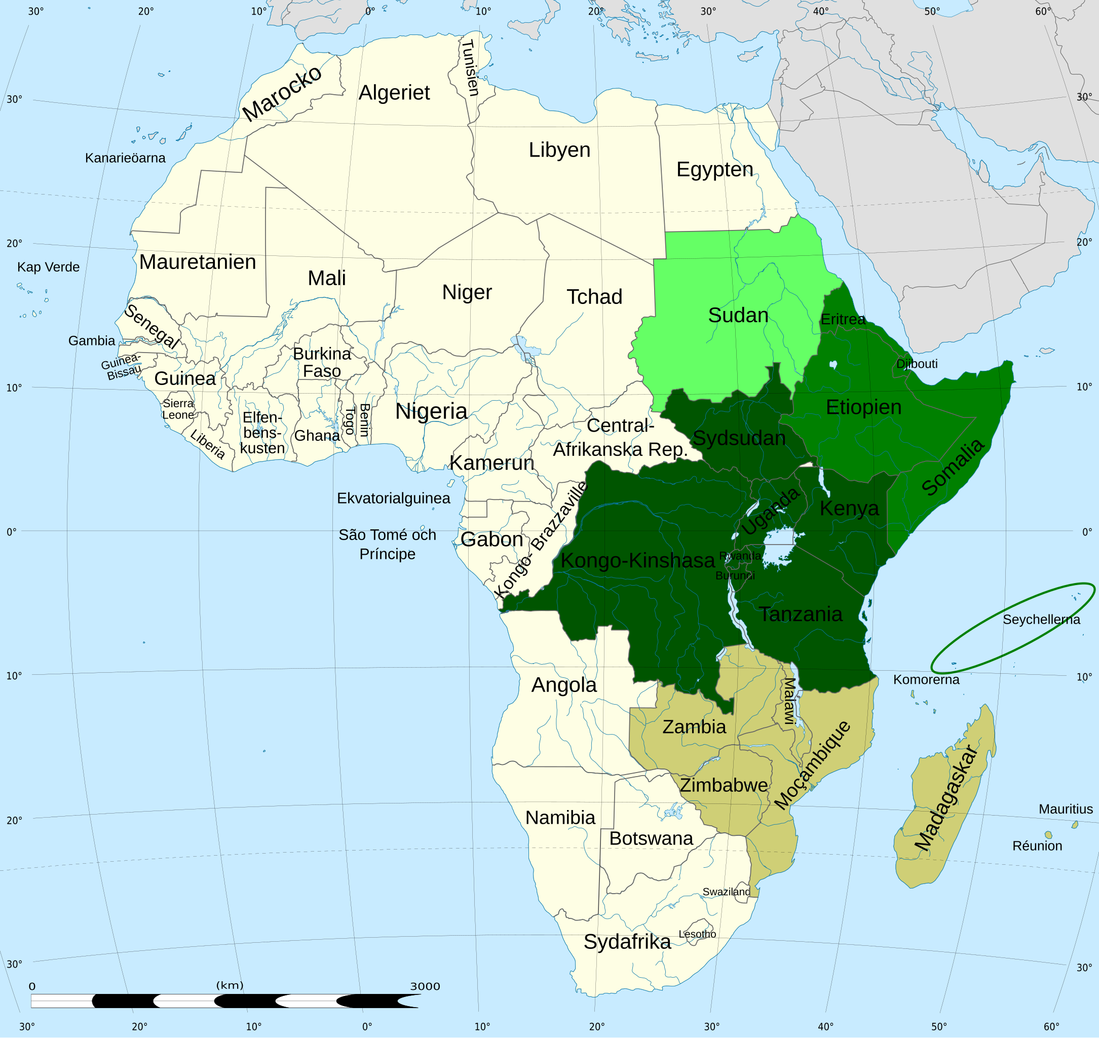 Länder som ofta eller ibland brukar hänföras till Östafrika (gröna/ljusgröna), länder i Östafrikanska gemenskapen (mörkgröna), samt länder i FN:s definition av Östra Afrika (beigea).